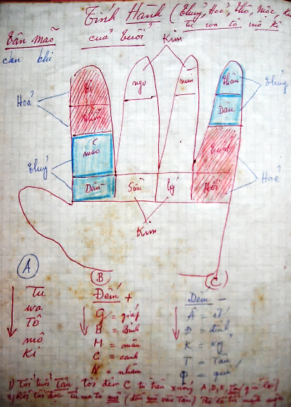 Tuvi2